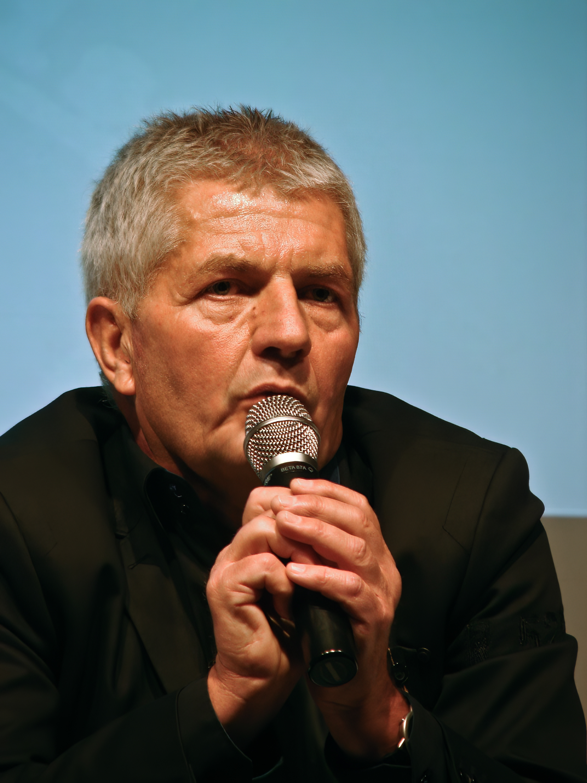 Der Bundesbeauftragte für die Stasi-Unterlagen Roland Jahn beim Bürgertag in der Stasizentrale